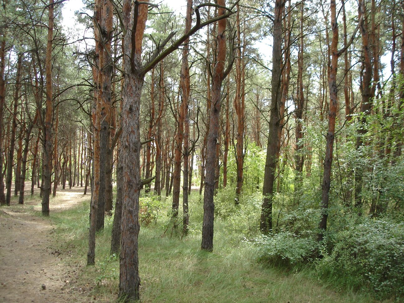 Соснові культури**, Першотравневий р-н, Стародубівське л-во, кв. 50, в. 2, 4